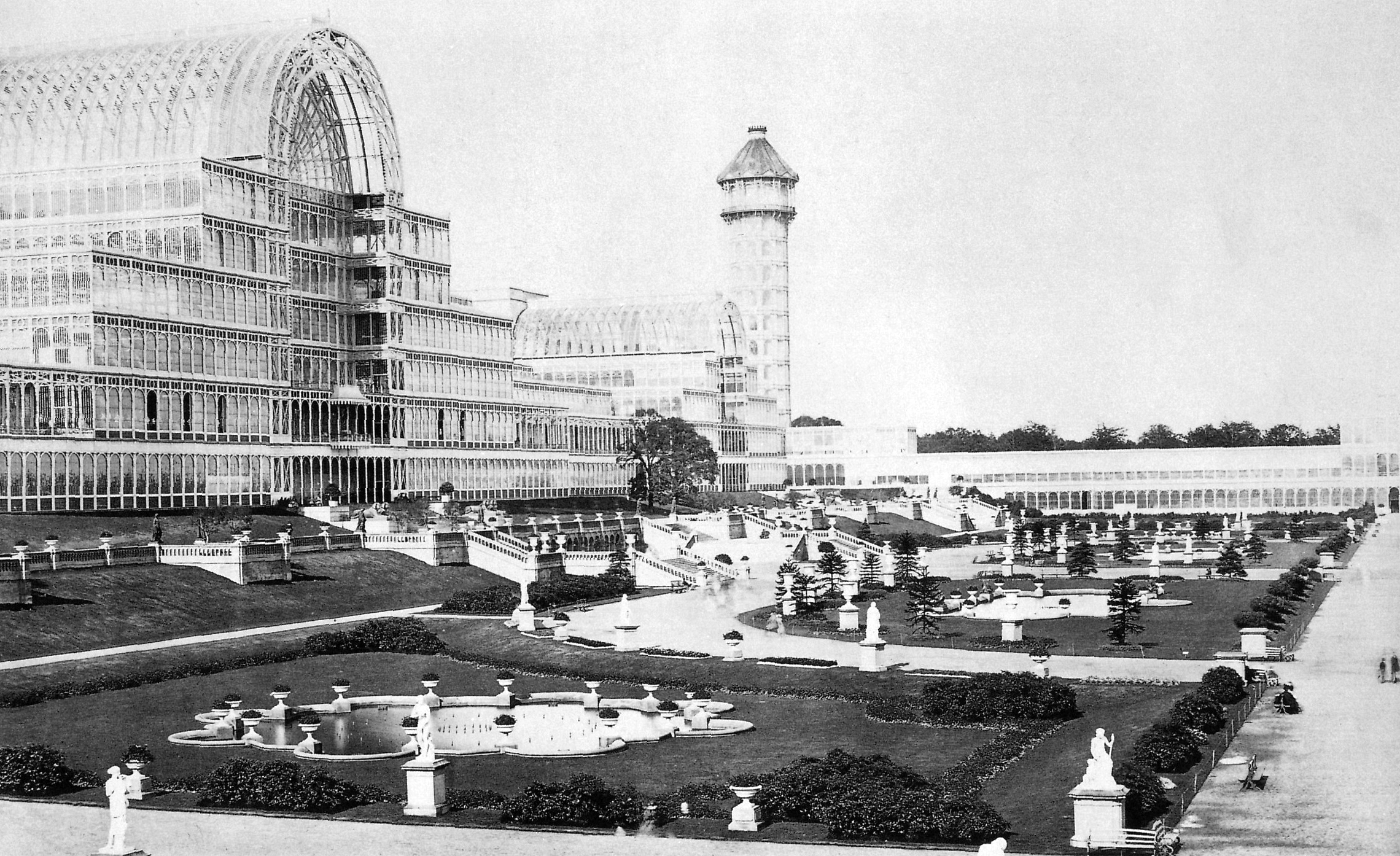 Außenansicht des Kristallpalasts nach der Verlegung des Gebäudes nach Sydenham, Süd-London, im Anschluss an die Ausstellung von 1851.